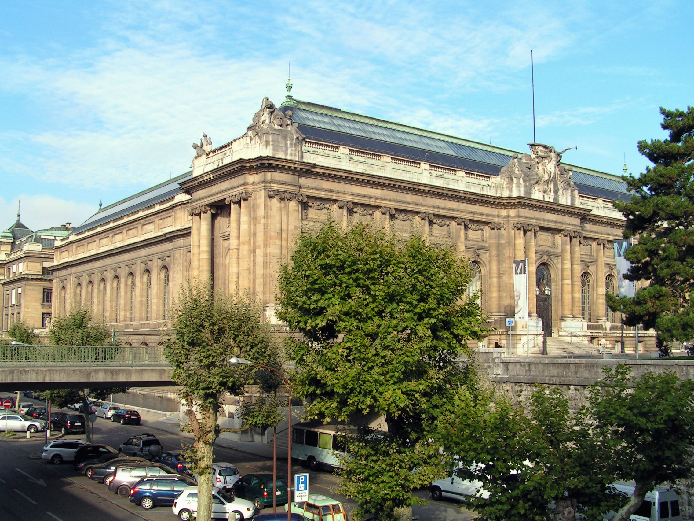 Rue Charles-Galland 2, Genève. Musée d'art et d'histoire.